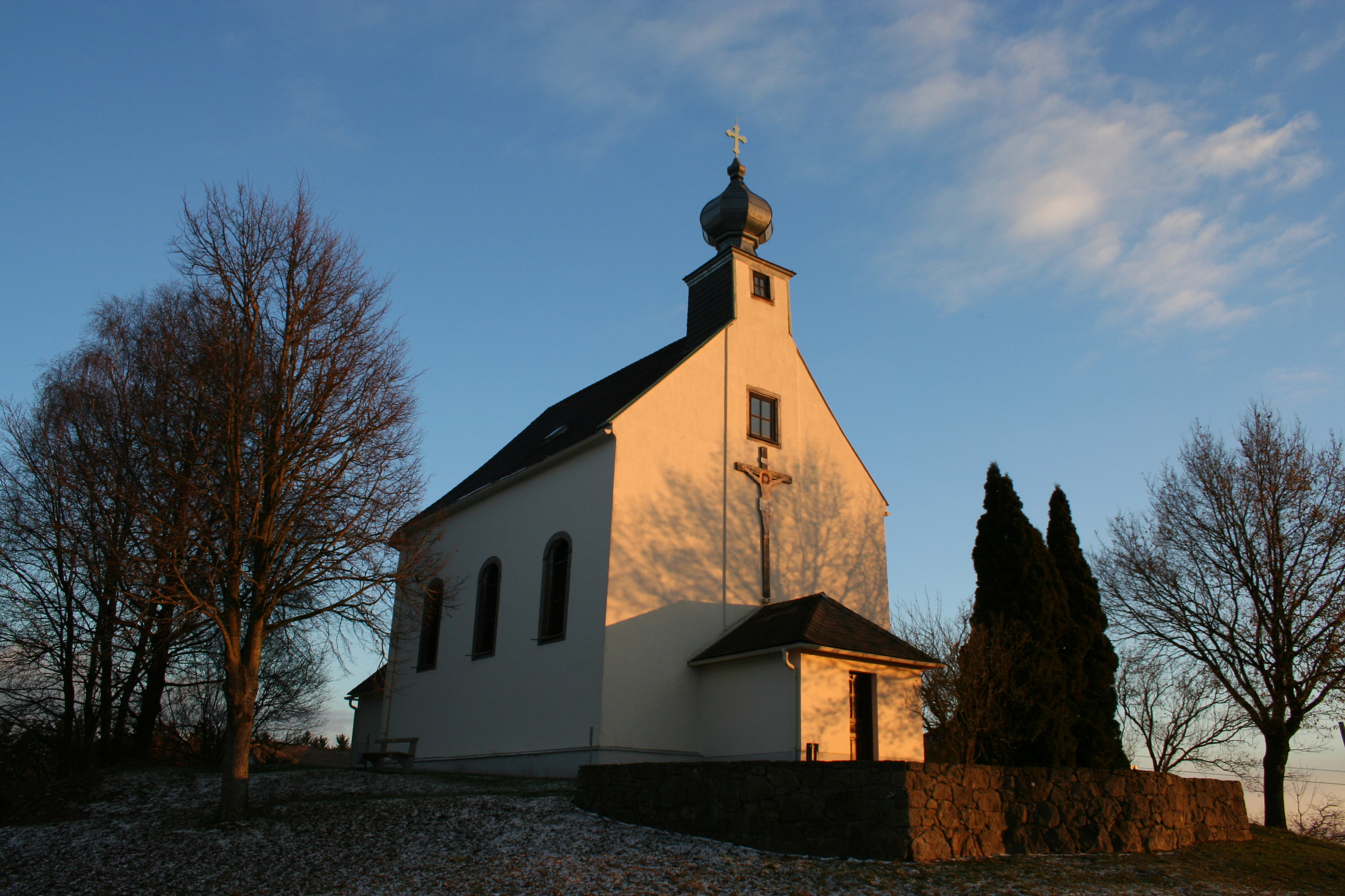 Kalvarienbergkirche